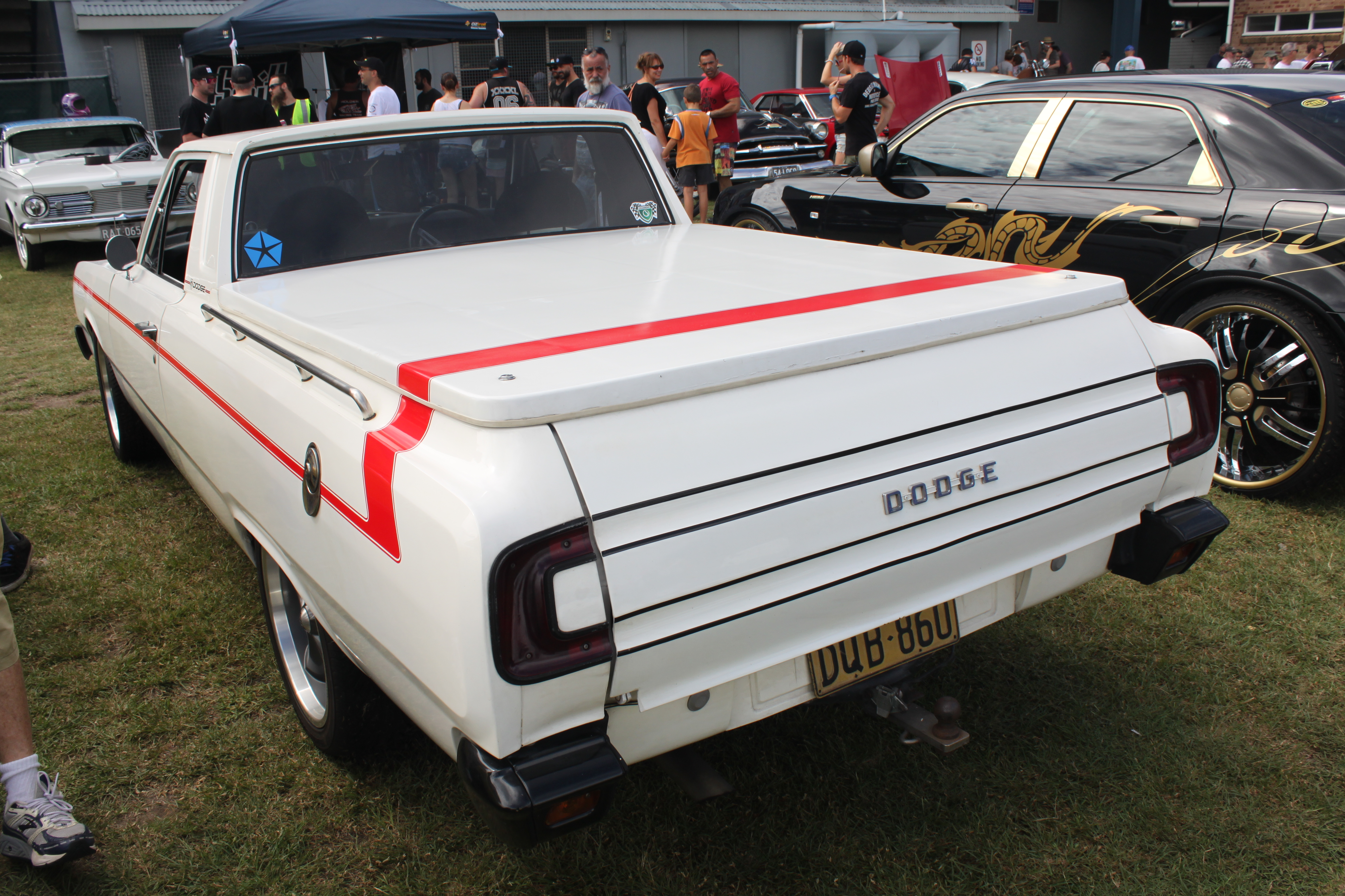 Car & Bike Fest, Pittwater Rugby Park 2015